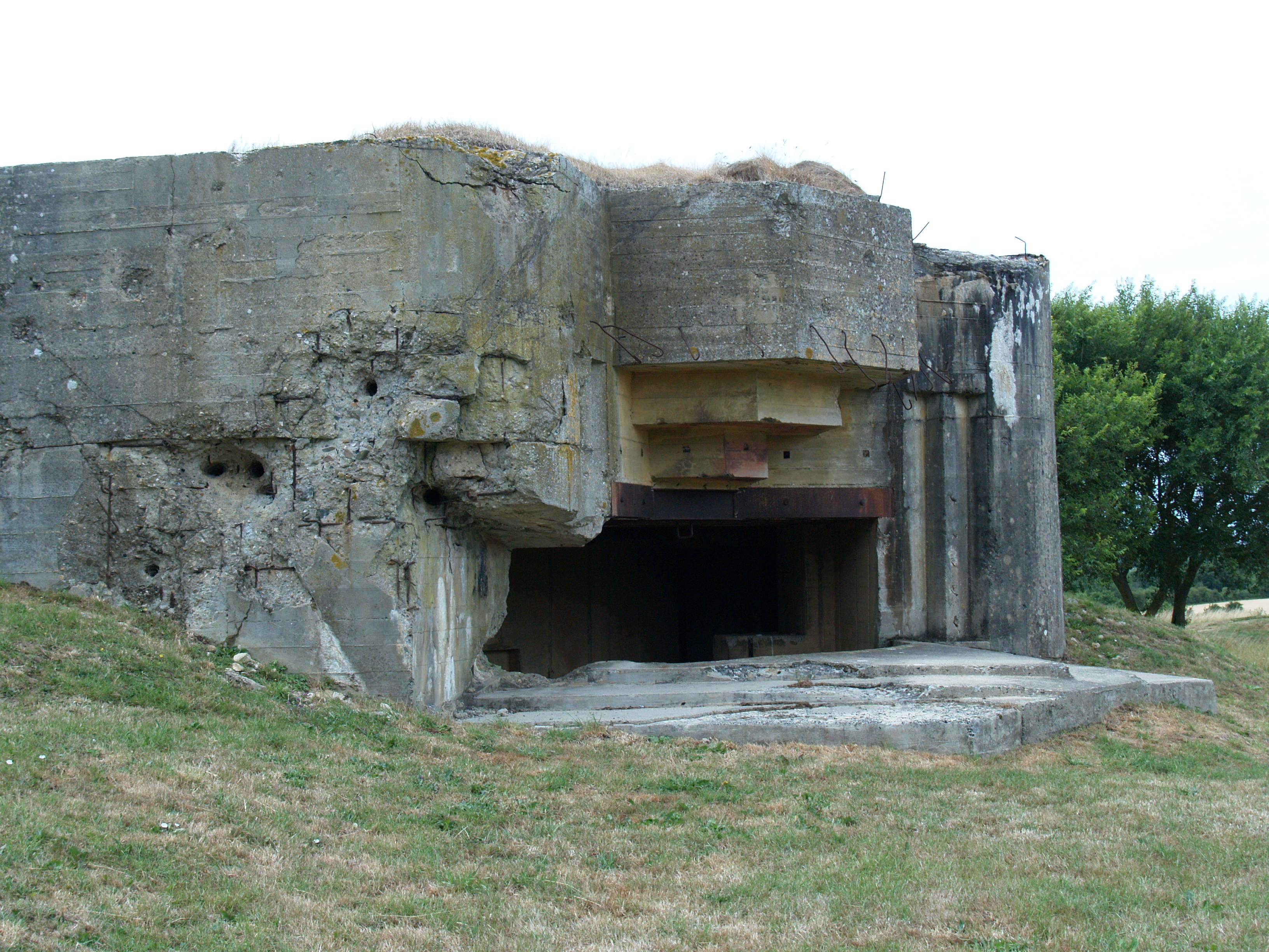 Azeville Battery